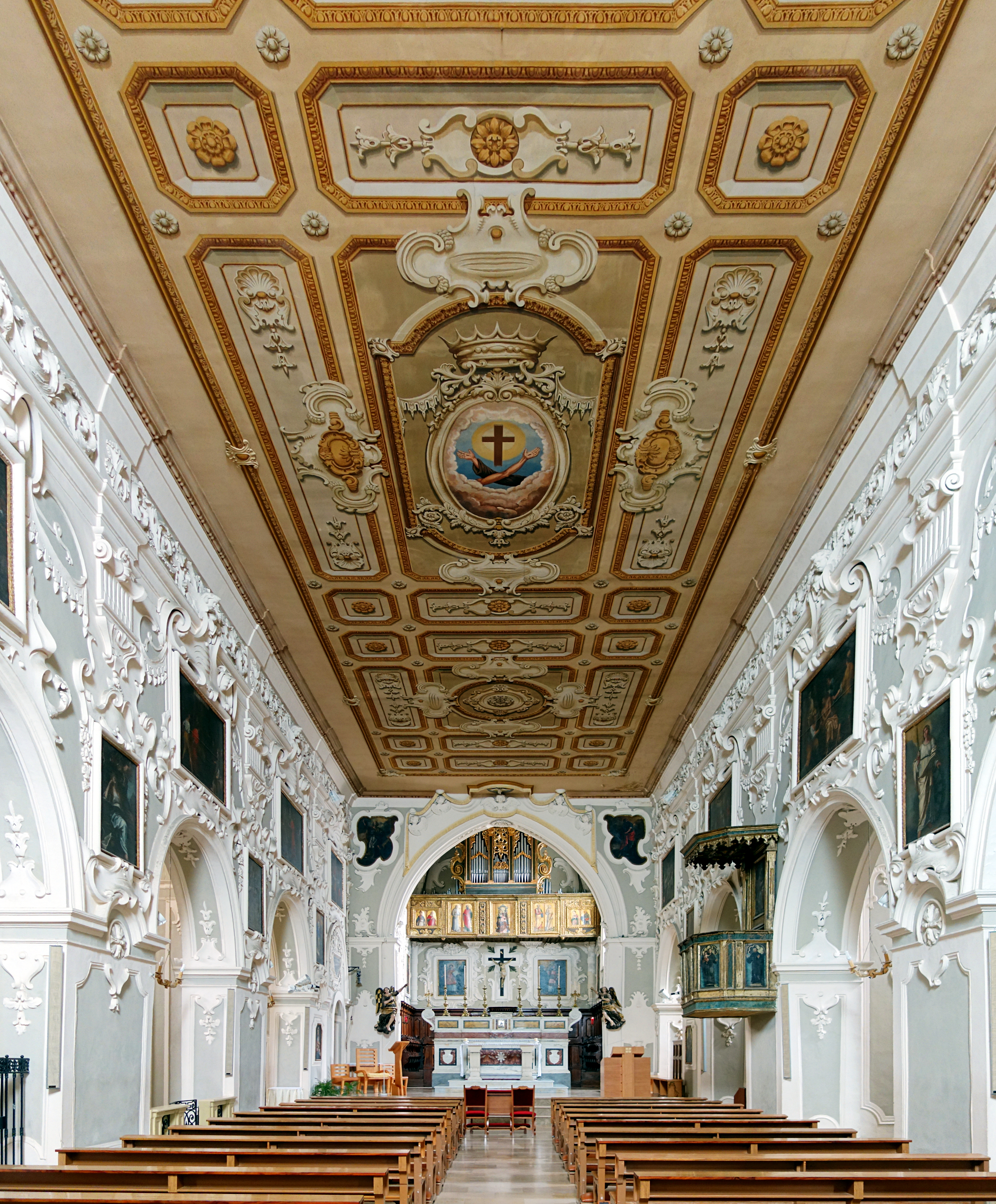 La nef de l'église San Francesco d'Assisi à Matera.